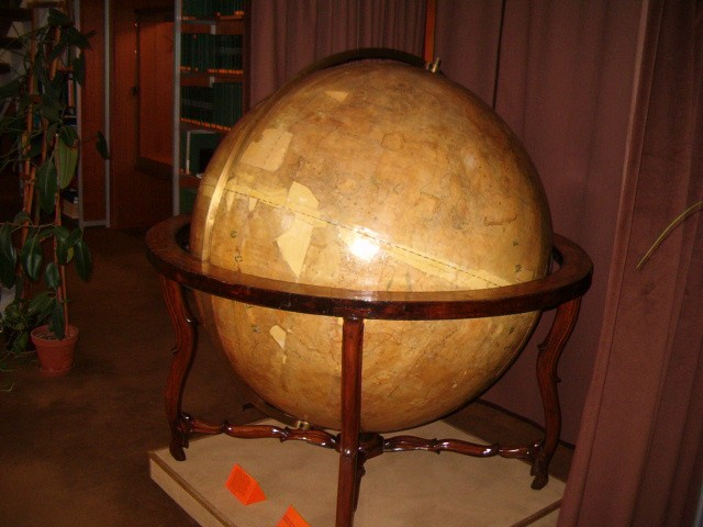 Perczel László földgömbje az OSzK térképtárában. "Perczel Mór fivére, Komárom megye volt alk. csendbiztosa, s kömlödi lakos, egy 4 láb átmérőjű földtekét készített s a nemzeti muzeumnak ajándékozá. Ugyancsak Perczel László, a ki, hogy milly kitünőleg és geometriai pontossággal rajzol, a jeles földtekéje mutatja, a londoni kiállításra is készitett volna - amint halljuk, egy, ennél még nagyobb földgömböt, de a mely valami véletlen malhaeur folytán, amidőn már majd teljesen készen volt, leesett és behorpadt, - lehet azonban, hogy e sérülése helyreállítható. A muzeumnak ajándékozott globuson az asztalosmunkát Mihályi Józsa, a rézöntő munkát pedig Stark József ügyes tatai mesterek készttették." Pesti Napló, 1862. márc. 15 (a földgömb talpán álló táblácska felirata) A földgömb az 1881. évi velencei földrajzi világkiállításon aranyérmet kapott [1] .